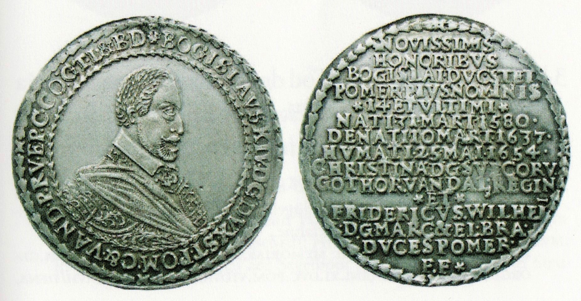 Reichstaler in Silber zum Tod von Herzog Bogislaw XIV. von Pommern